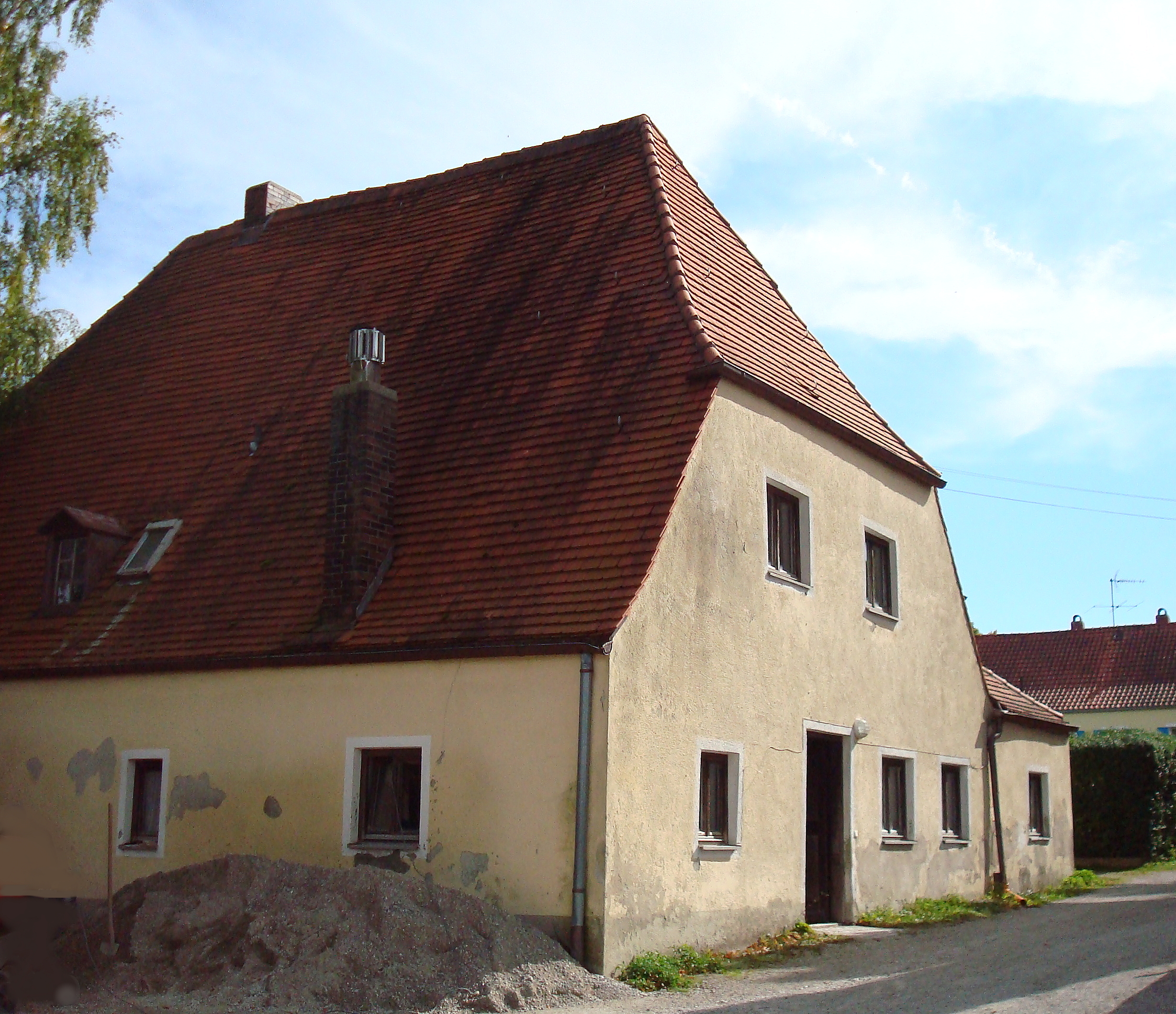 Seefeld, OT Oberalting, Marienplatz 9. Das ehemalige Spital, ein Gebäude mit hohem Halbwalmdach, stammt im Kern wohl aus dem 15. Jahrhundert. 1820/30 wurde es erneuert und ein zweigeschossiger Südosttrakt mit Walmdach angebaut. Gegründet wurde die soziale Einrichtung bereits 1439 und bestand bis in die Zeit vor dem Zweiten Weltkrieg. This is a photograph of an architectural monument.